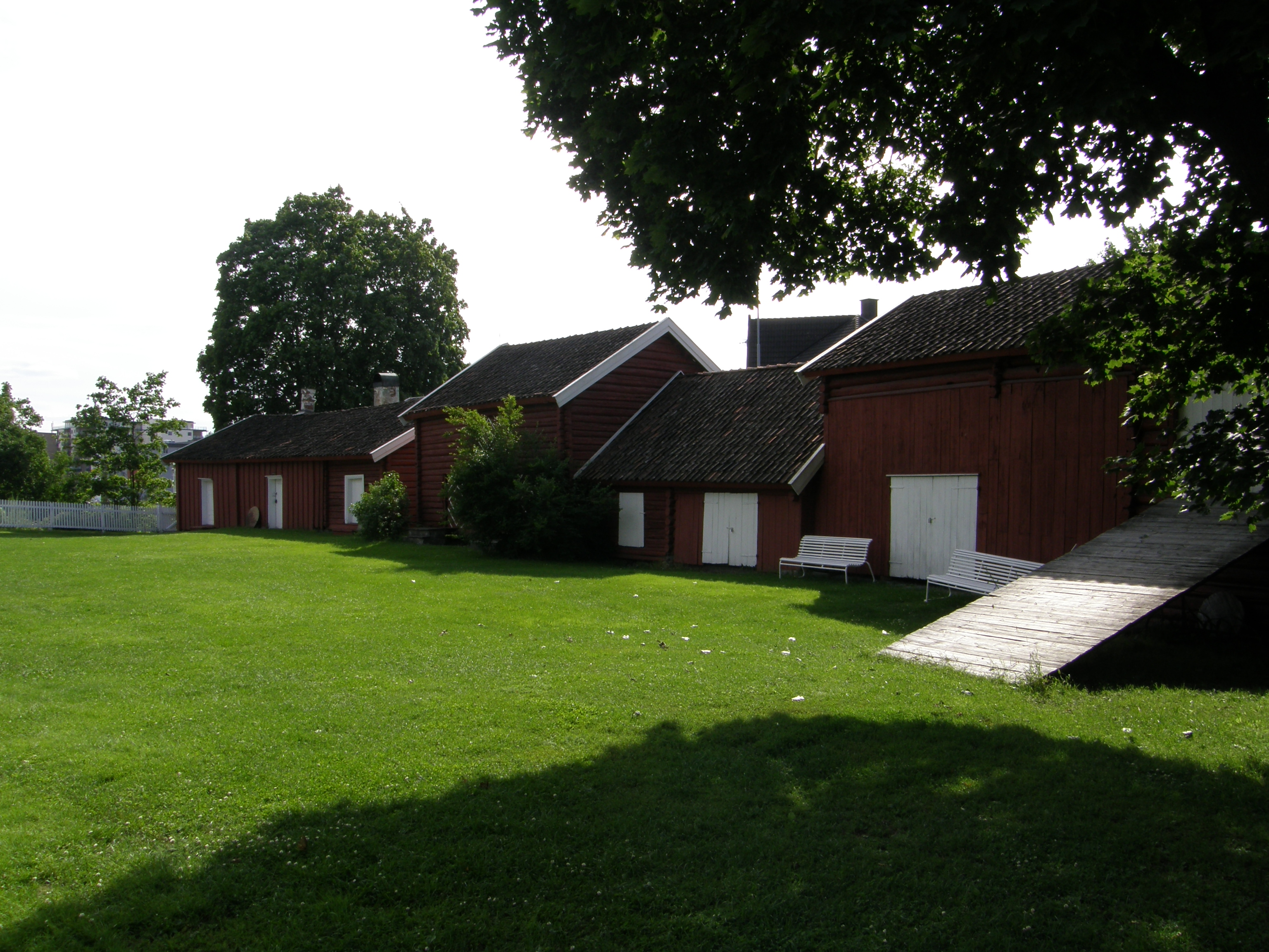 Riddergården, Hønefoss (gårdstunet, mot sør)